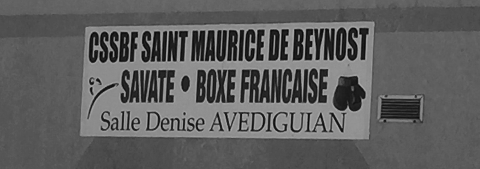 Plaque de la salle de boxe française de Saint-Maurice-de-Beynost, baptisée "salle Denise-Avédiguian" depuis le 30 mai 2015.